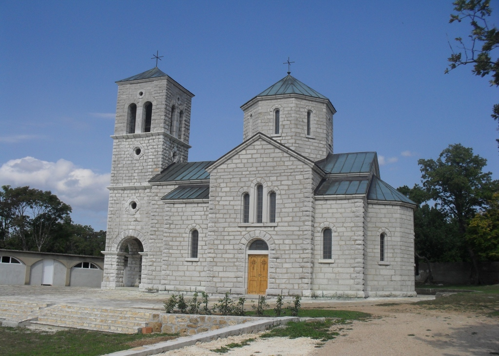 Манастир Оћестово. Храм СПЦ посвећен Св. великомученици Недјељи у Оћестову, Далмација.